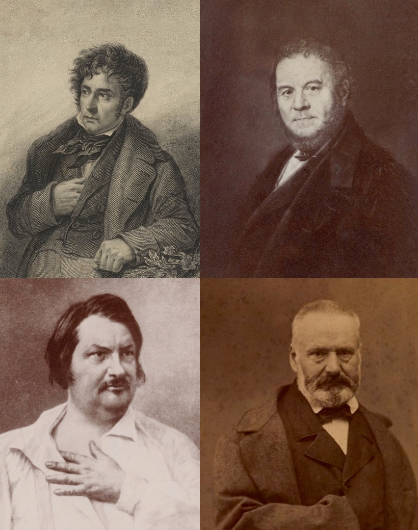 Chateaubriand, Stendhal, Balzac, Hugo, quatre portraits d'écrivains Source Chateaubriand : Source Stendhal : Source Balzac : Source Hugo